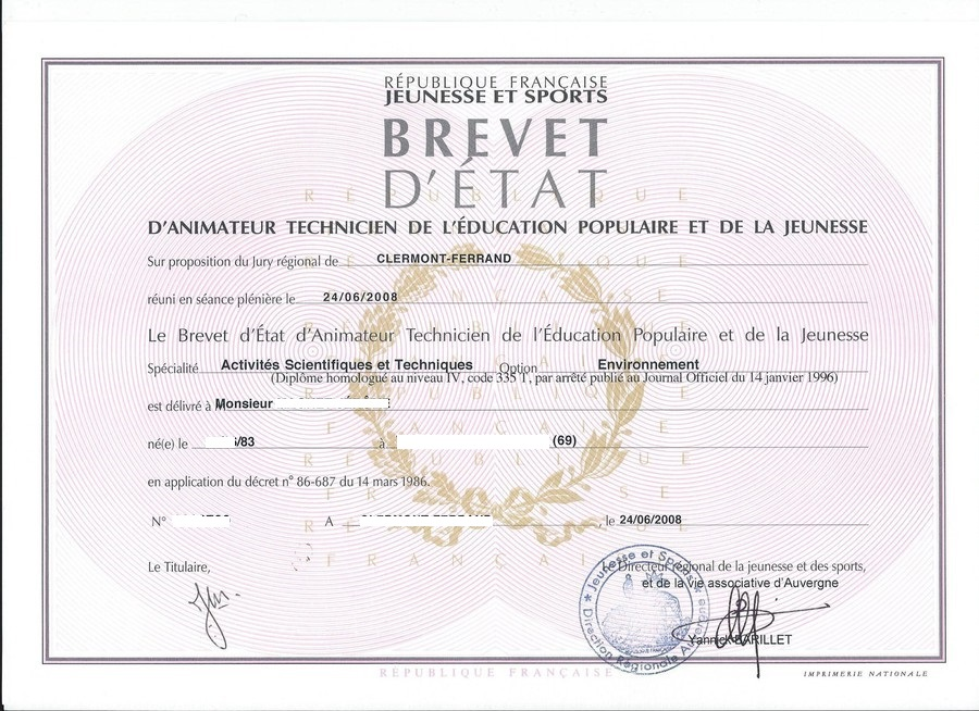 BEATEP remplacé par le BPJEPS Spécialité animateur socioculturel Option EEDD